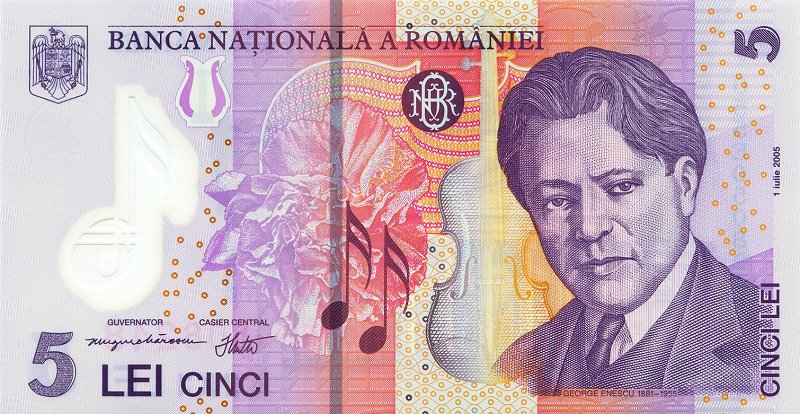 5 Leu anverse